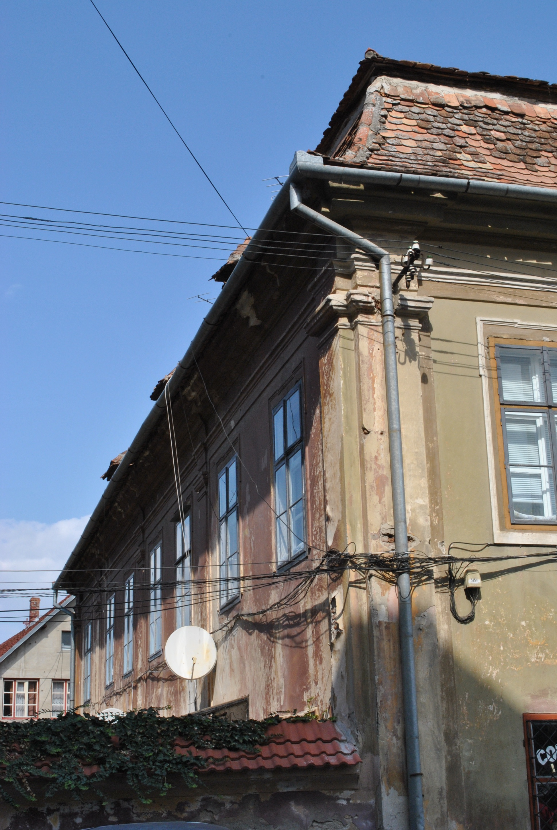 Casa de vară Brukenthal, sec. XVIII